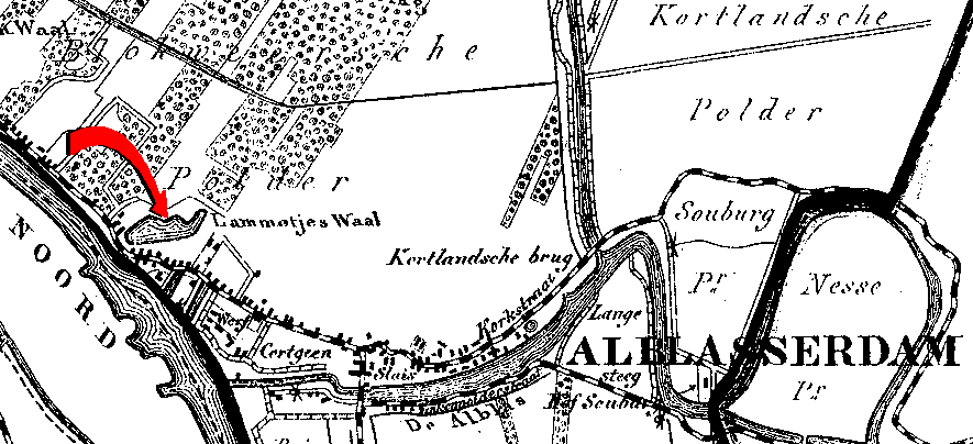 Fragment omgeving Alblasserdam (de locatie van het Lammetjeswiel ("Lammetjeswaal") door mij met rode pijl gemarkeerd)